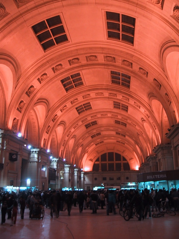 Estación Constitución, barrio de Constitución, Buenos Aires, Argentina.Constitution station, Buenos Aires